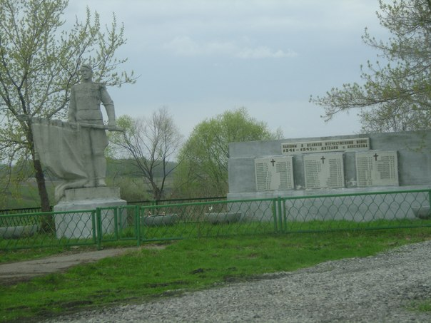 обелиск павшим во время Великой Отечественной Войны